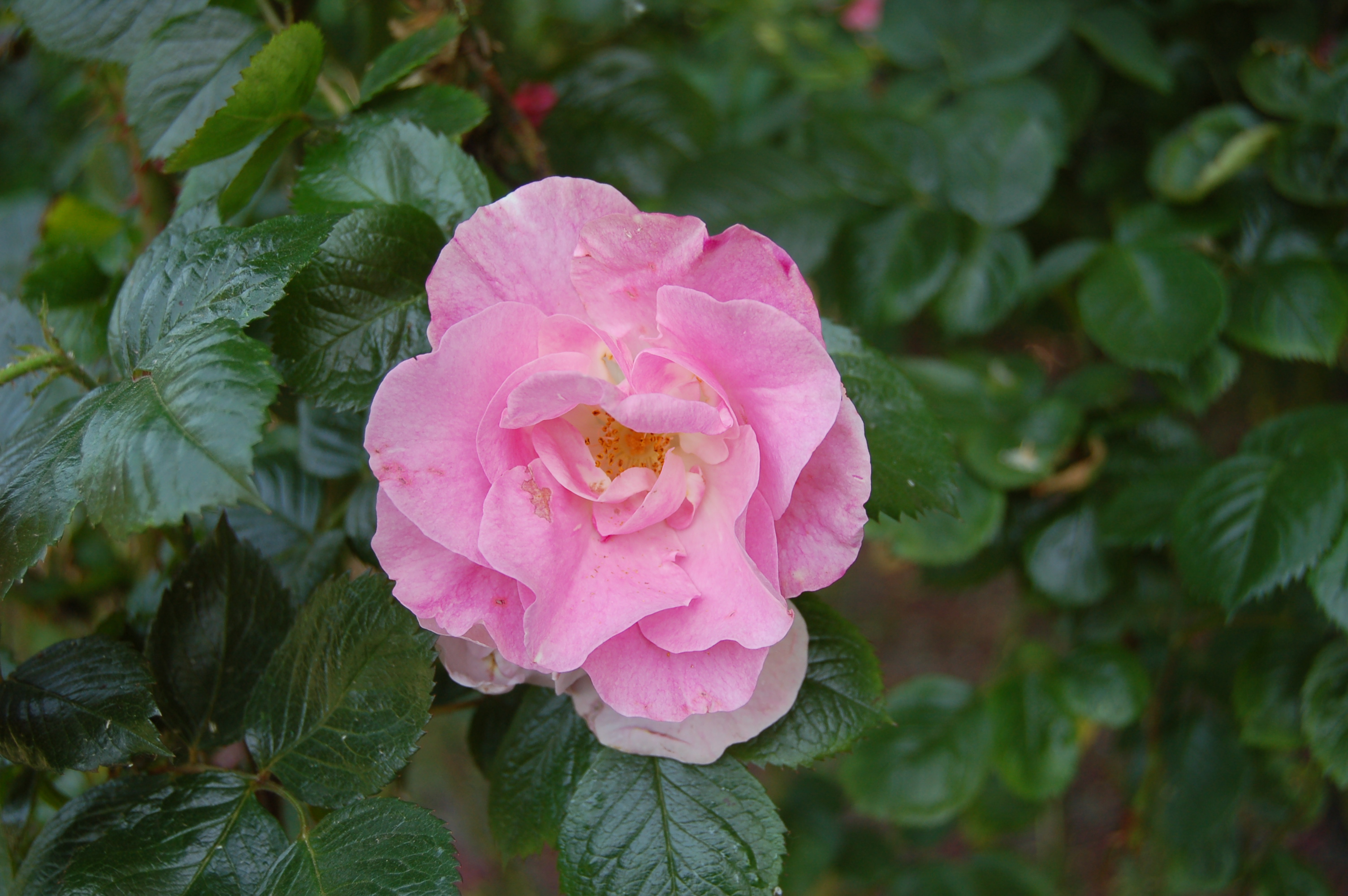 Rosa 'Pink Robusta'